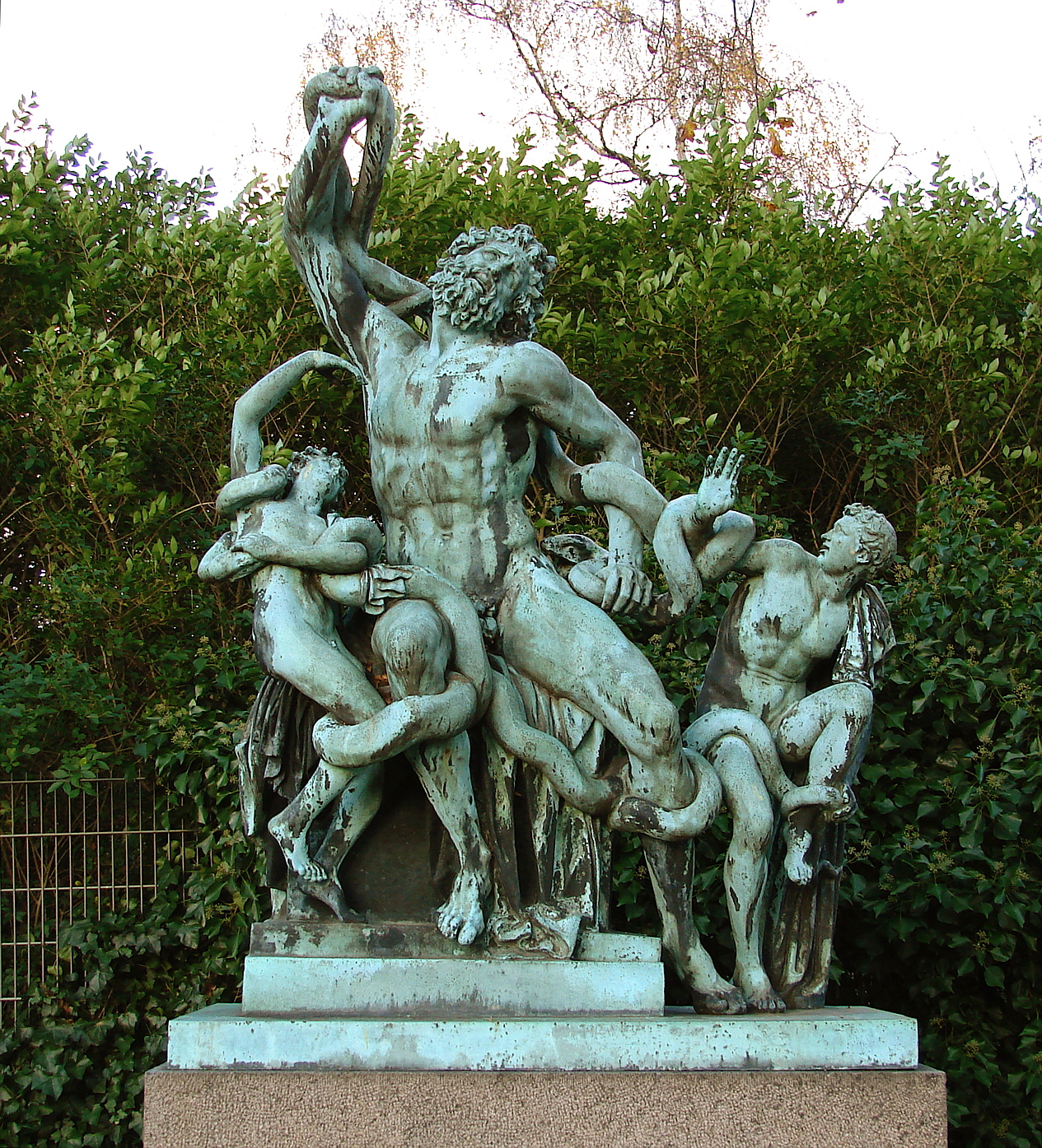 Laokoongruppen, afstøbning af romersk statuegruppe fra 1. århundrede e. Kr, opstillet 1925, Hans Tavsens Park, København